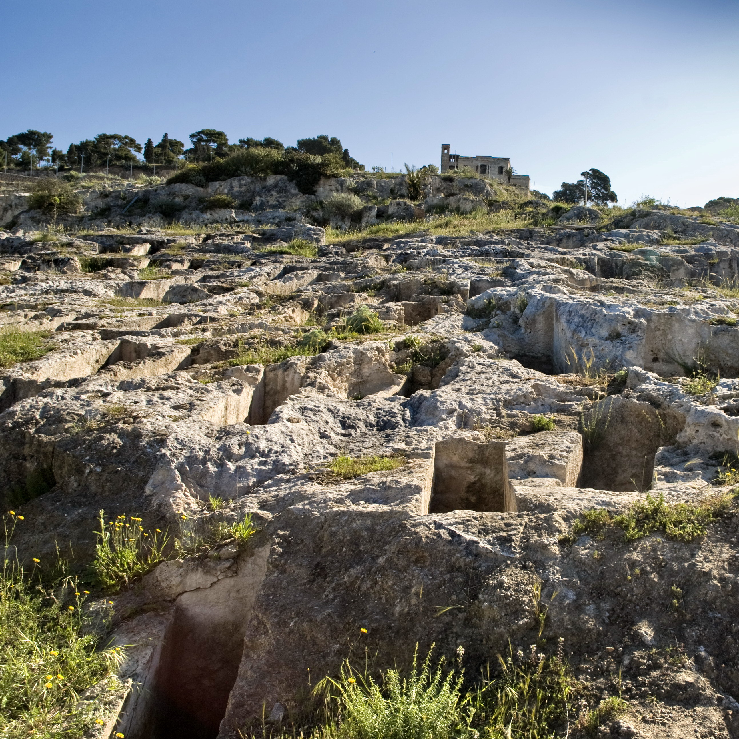 Necropoli di Tevixeddu - MIBAC This is a photo of a monument which is part of cultural heritage of Italy.